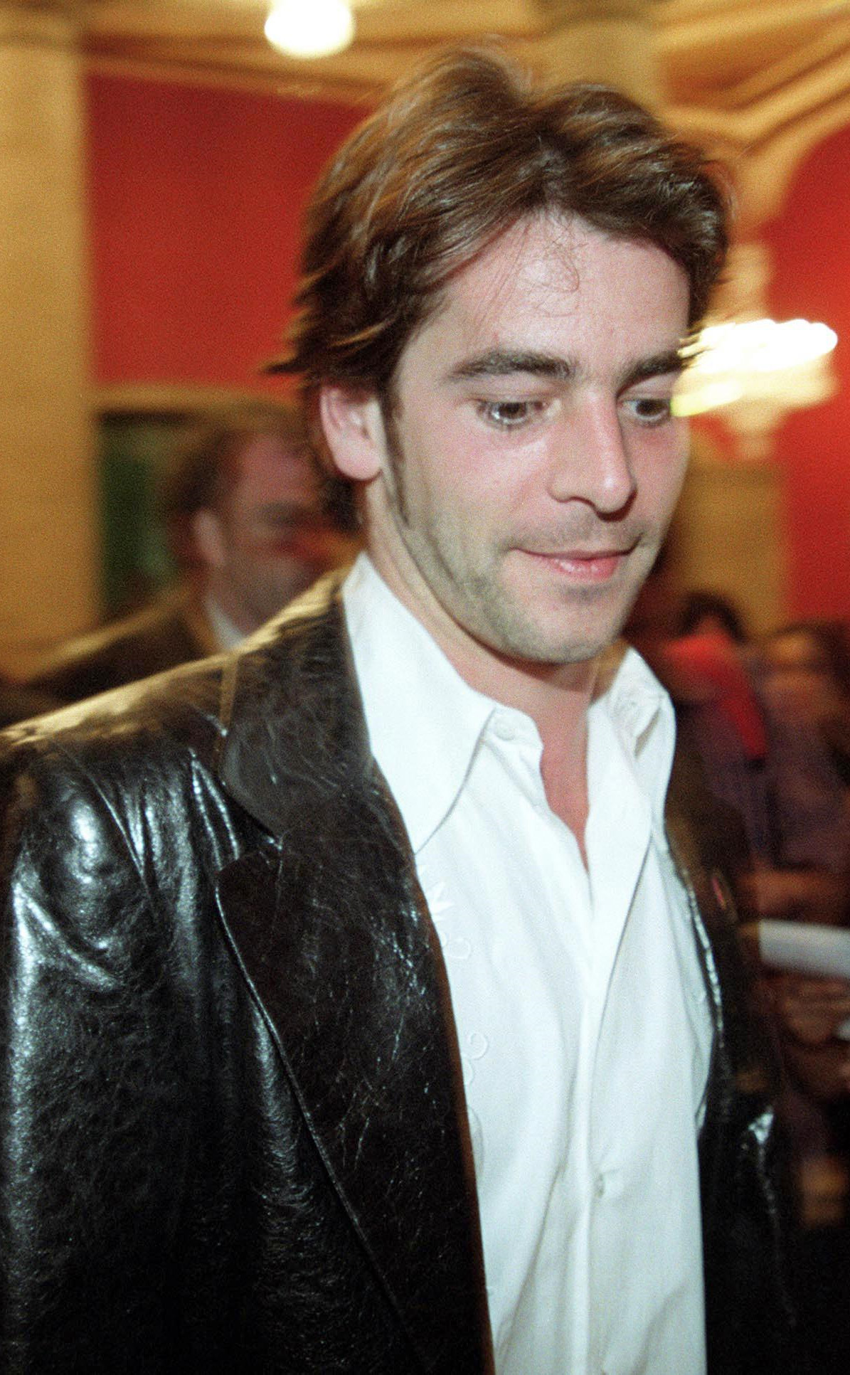 Folio 9899 020308 nueva arte y gente inauguracion de la xvii muestra de cine mexicano en guadalajara. Eduardo noriega al ingresar al teatro degollado. Foto carlos alberto contreras duran ccd022